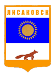 Wappen von Lissakowsk (Kasachstan)